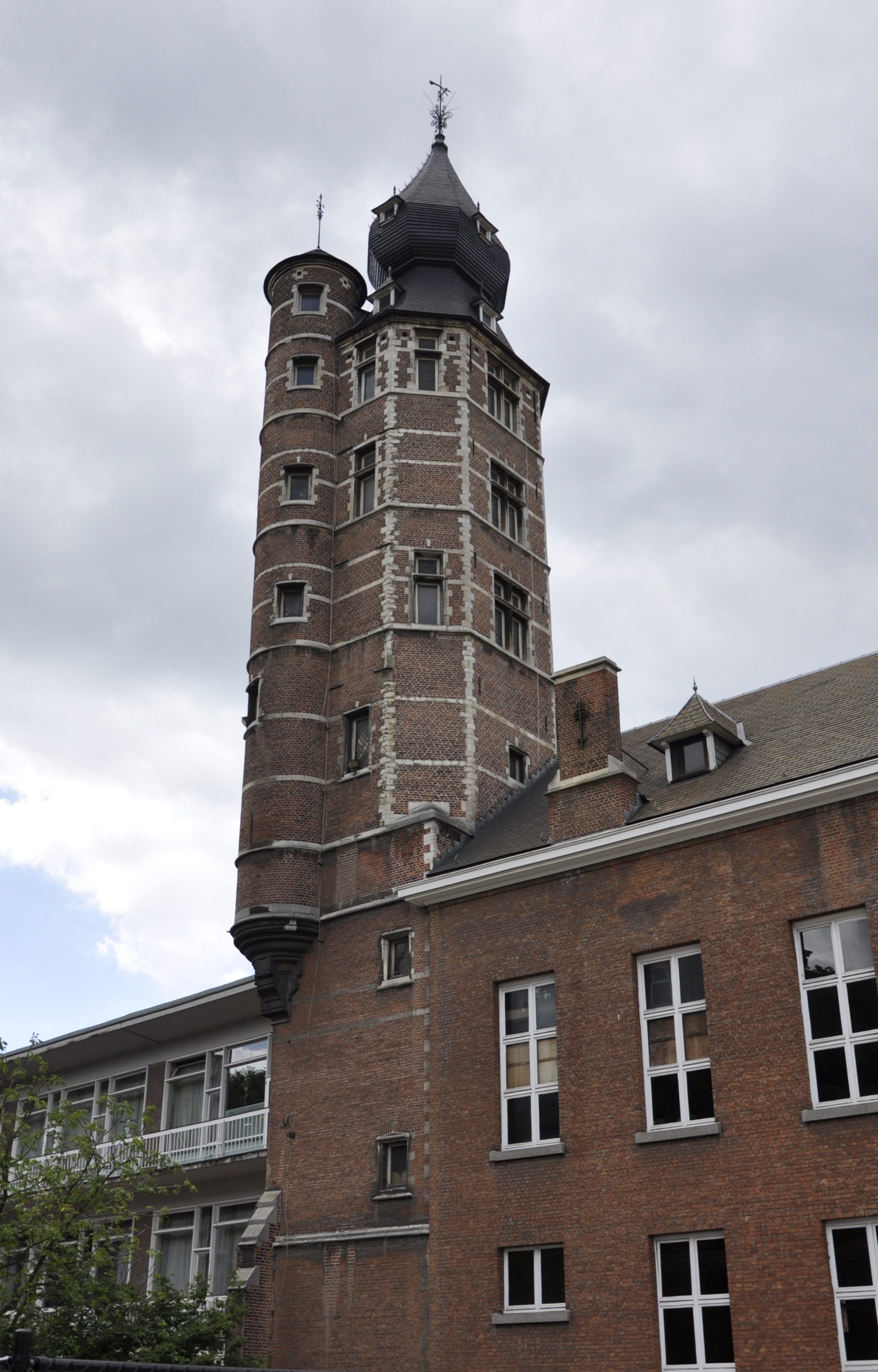 Toren van het voormalig Hof van Hoogstraten (16e-eeuws), deel van het Berthoutinstituut Klein Seminarie Mechelen